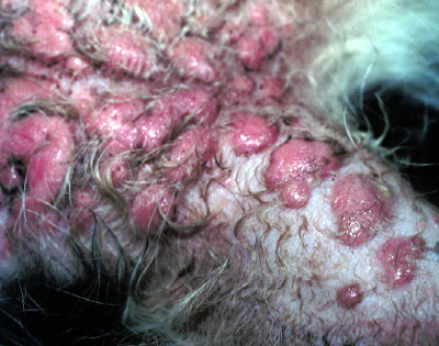 feline eosinophilic plaque